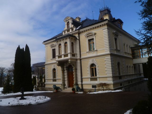 Villa_Schmederer-Rückseite